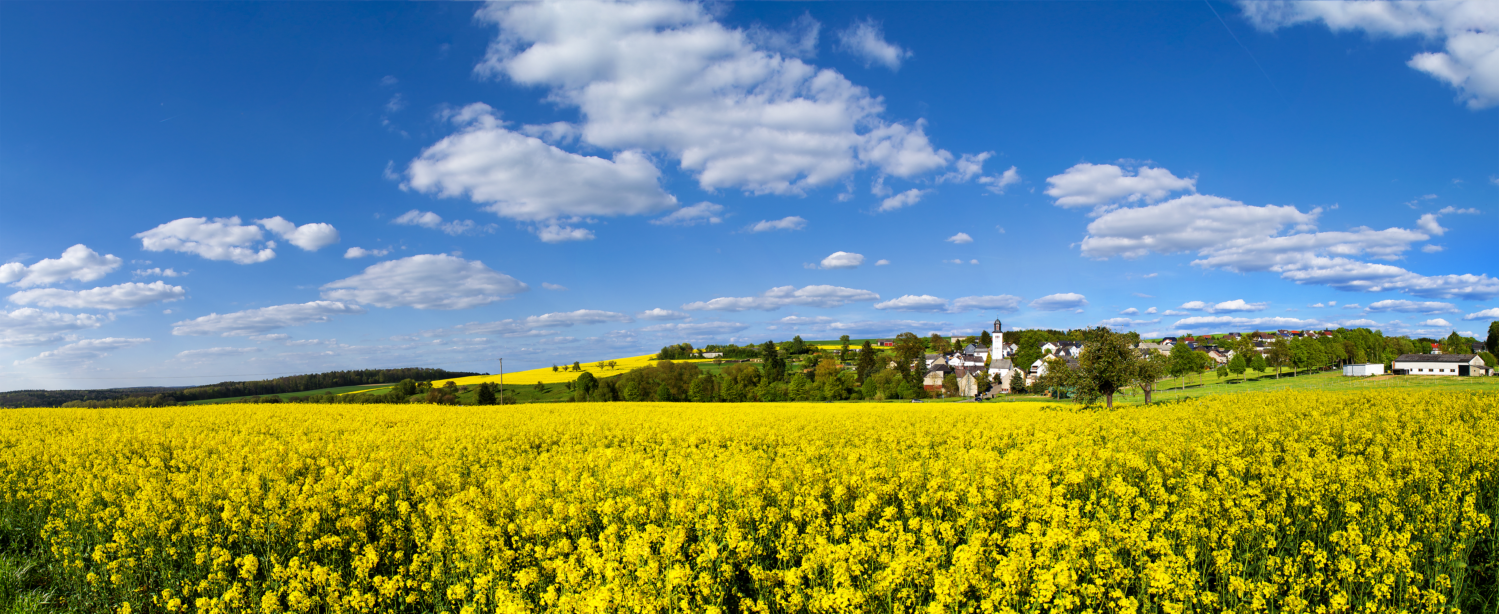 Rupertshofen im Rhein-Lahn Kreis